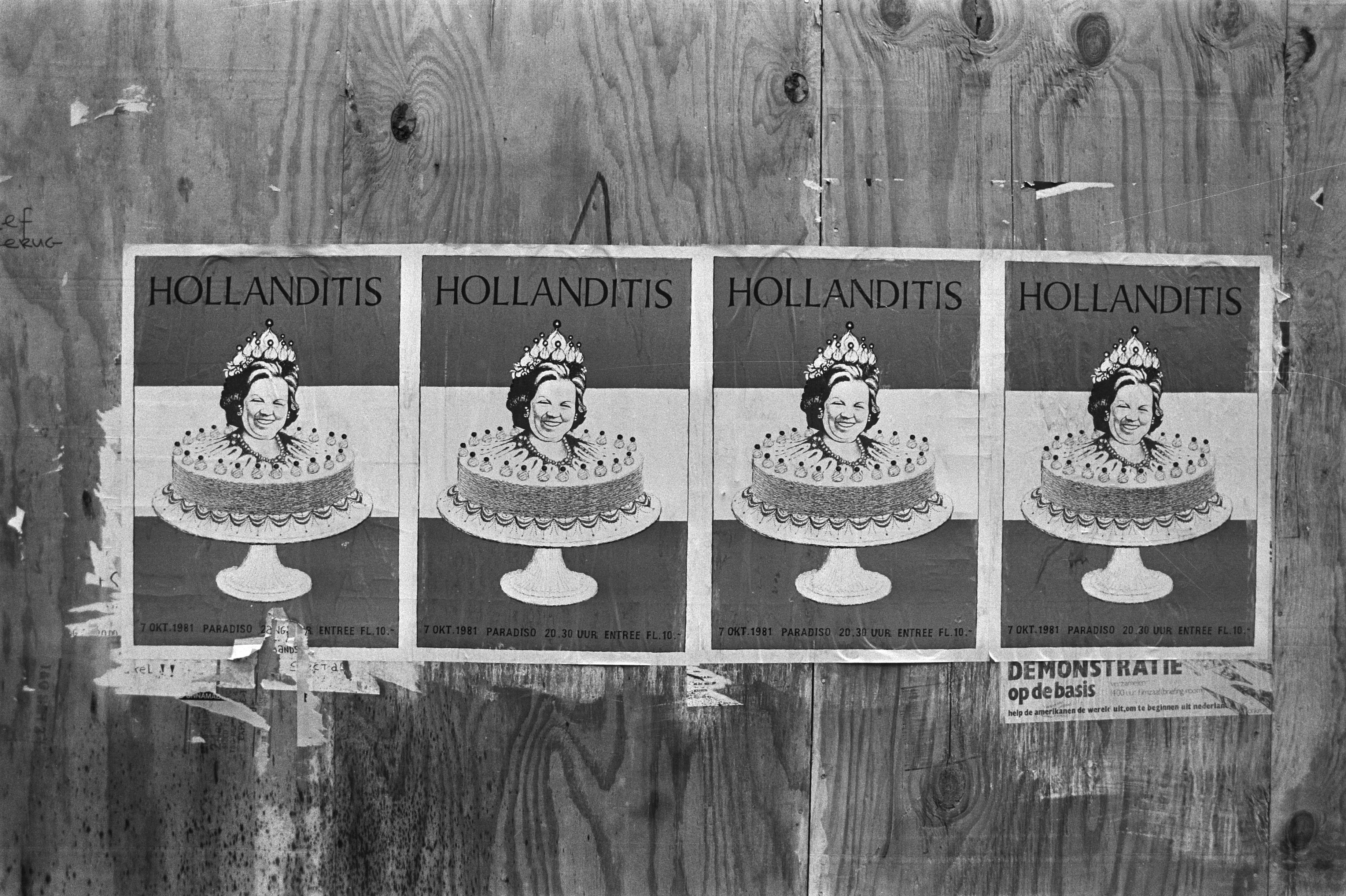 Collectie / Archief : Fotocollectie Anefo Reportage / Serie : [ onbekend ] Beschrijving : Affiche van Hollanditis Datum : 16 oktober 1981 Trefwoorden : affiches Fotograaf : Antonisse, Marcel / Anefo Auteursrechthebbende : Nationaal Archief Materiaalsoort : Negatief (zwart/wit) Nummer archiefinventaris : bekijk toegang 2.24.01.05 Bestanddeelnummer : 931-7437